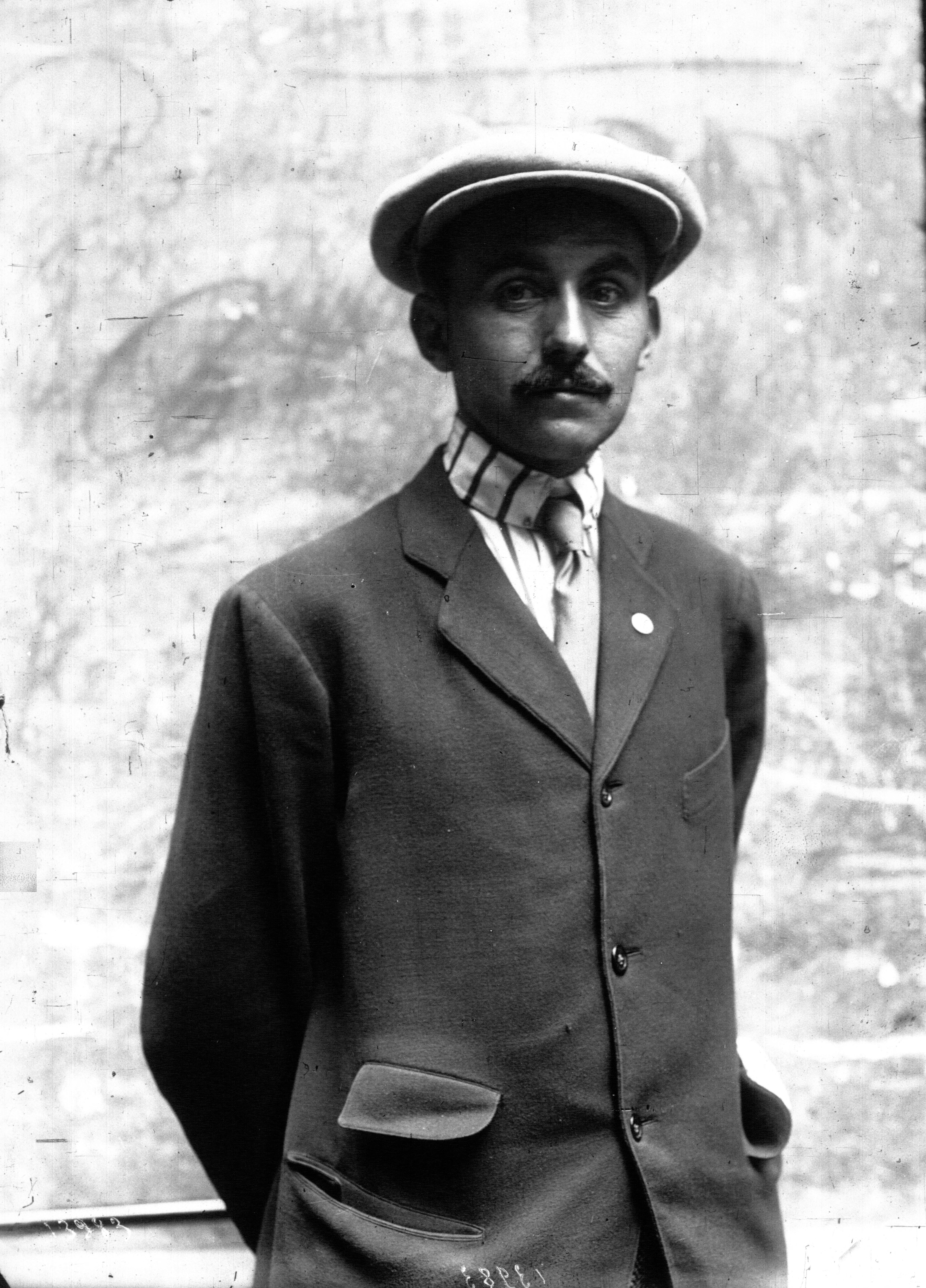 Tour de France : Petit Breton, portrait.